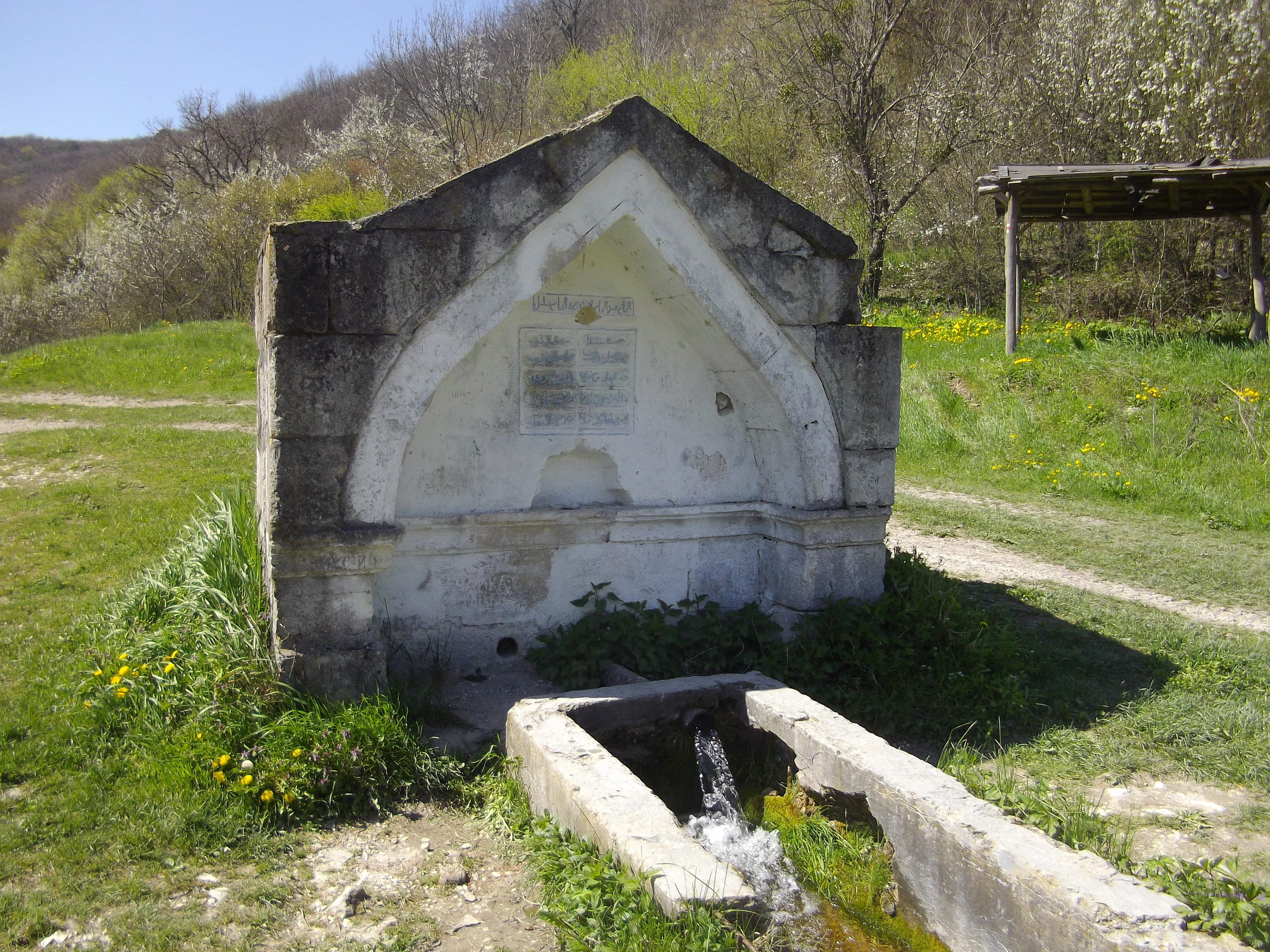 Родник бывшего села Истоки, Бахчисарайский район, Крым.